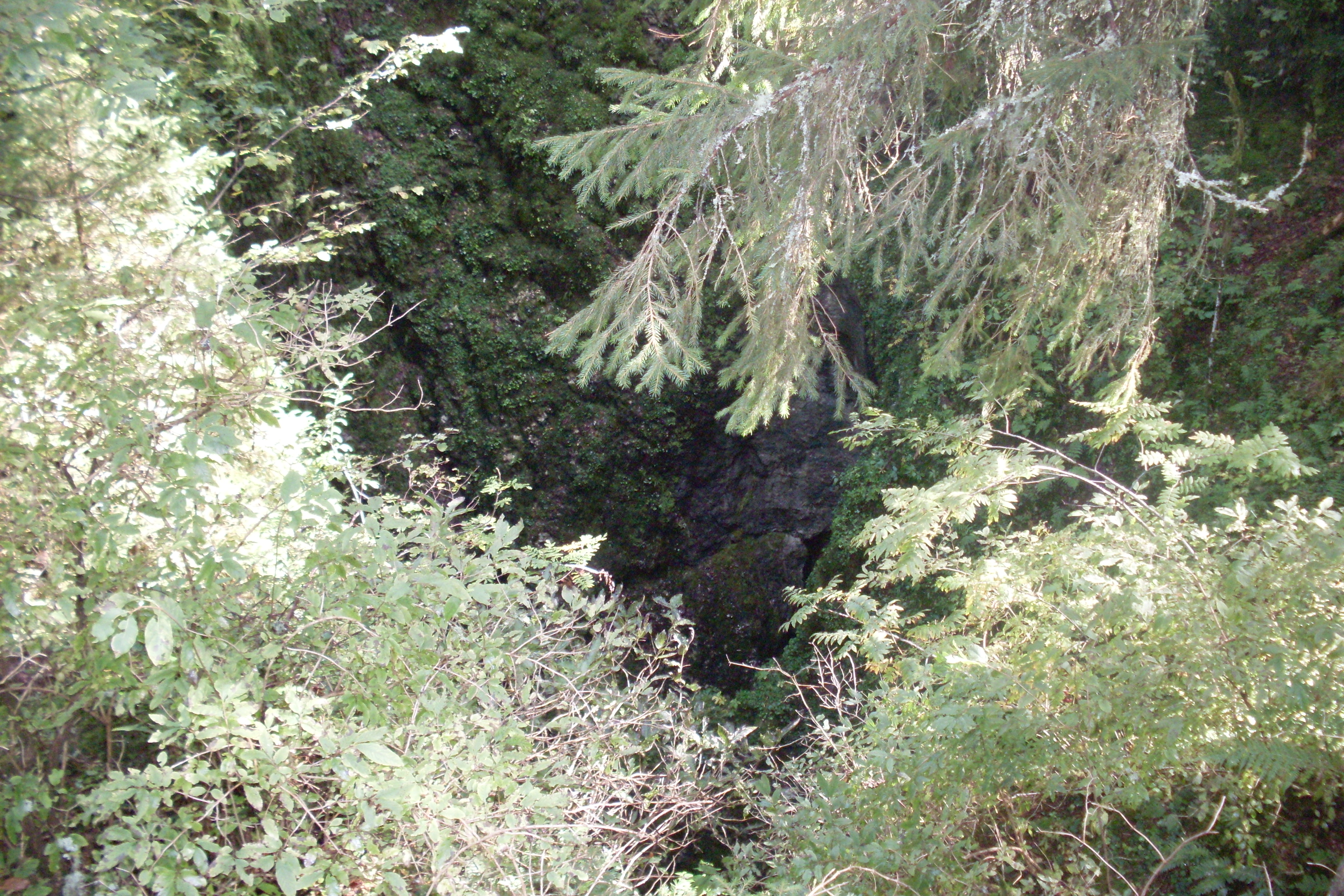 uno scorcio della foiba del Bus de la Lum (Pian del Cansiglio)